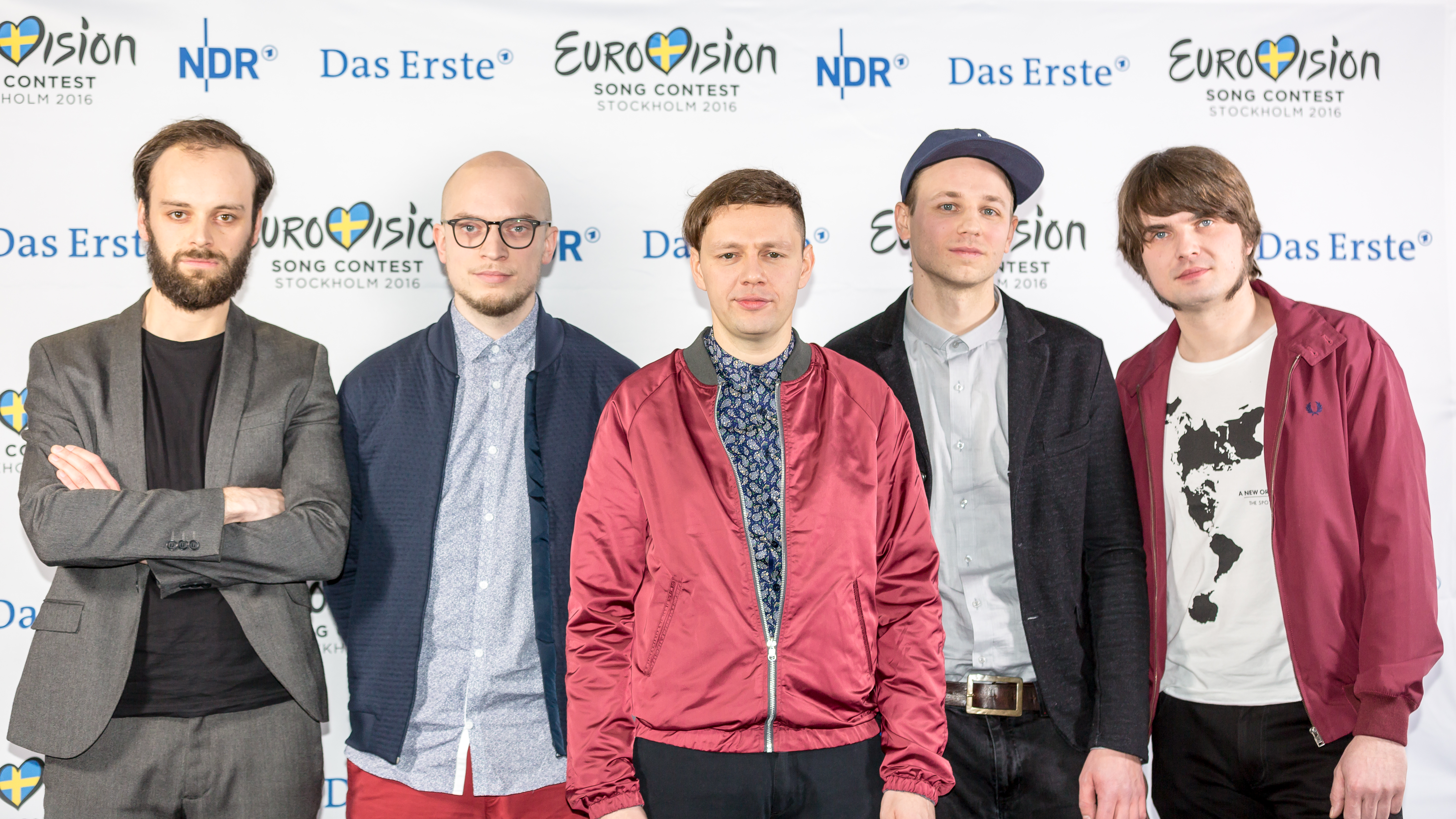 Unser Lied für Stockholm - Pressekonferenz am Probentag: Woods of Birnam Foto: Mitte: Christian Friedel